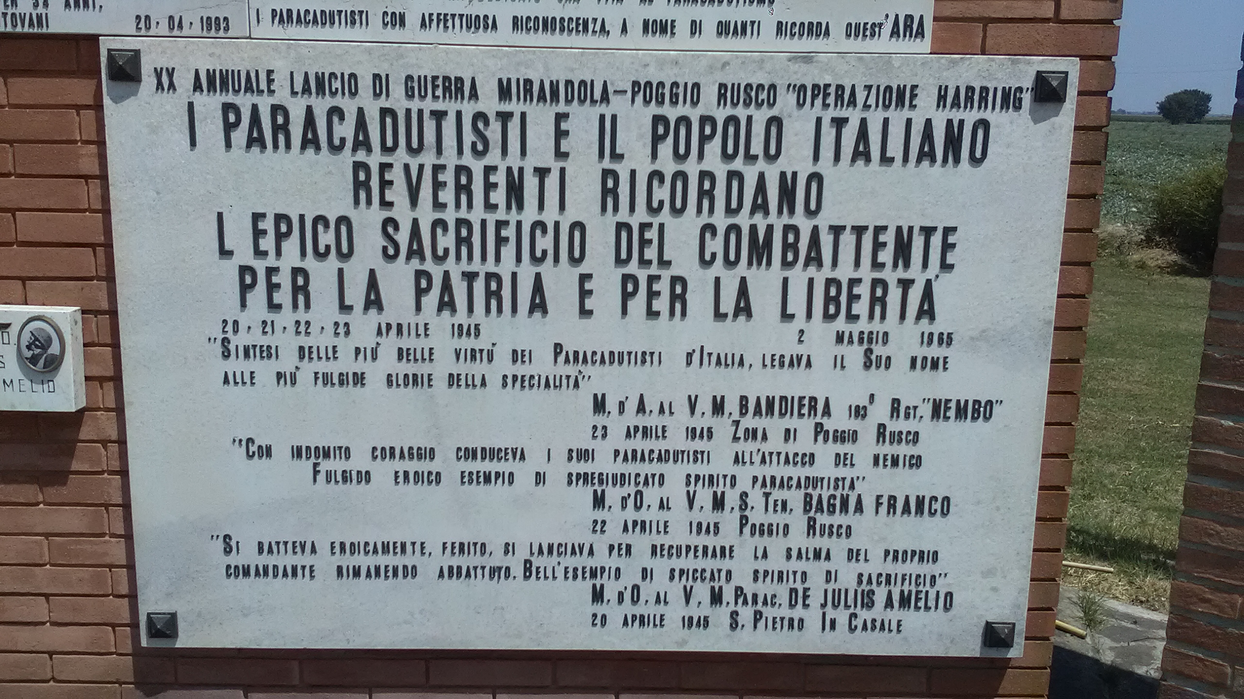 Monumento Operazione Herring - Dragoncello